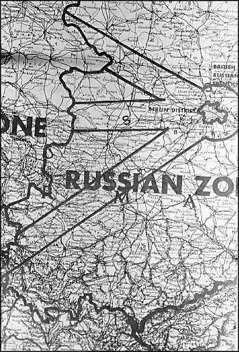 Corridoi aerei per il ponte di Berlino Fonte: Berlin Airlift Photo Gallery